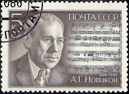 Почтовая марка СССР - Новиков Анатолий Григорьевич, Герой Социалистического Труда